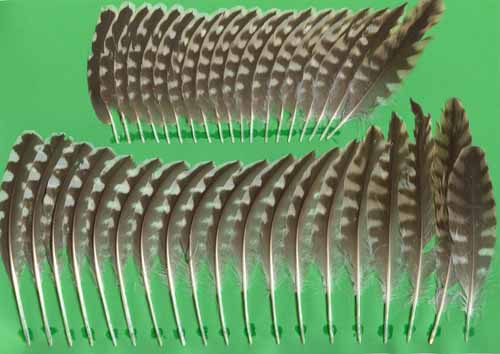 Armschwingen (mit gr. Armdecken) eines Großen Brachvogels (Numenius arquata)